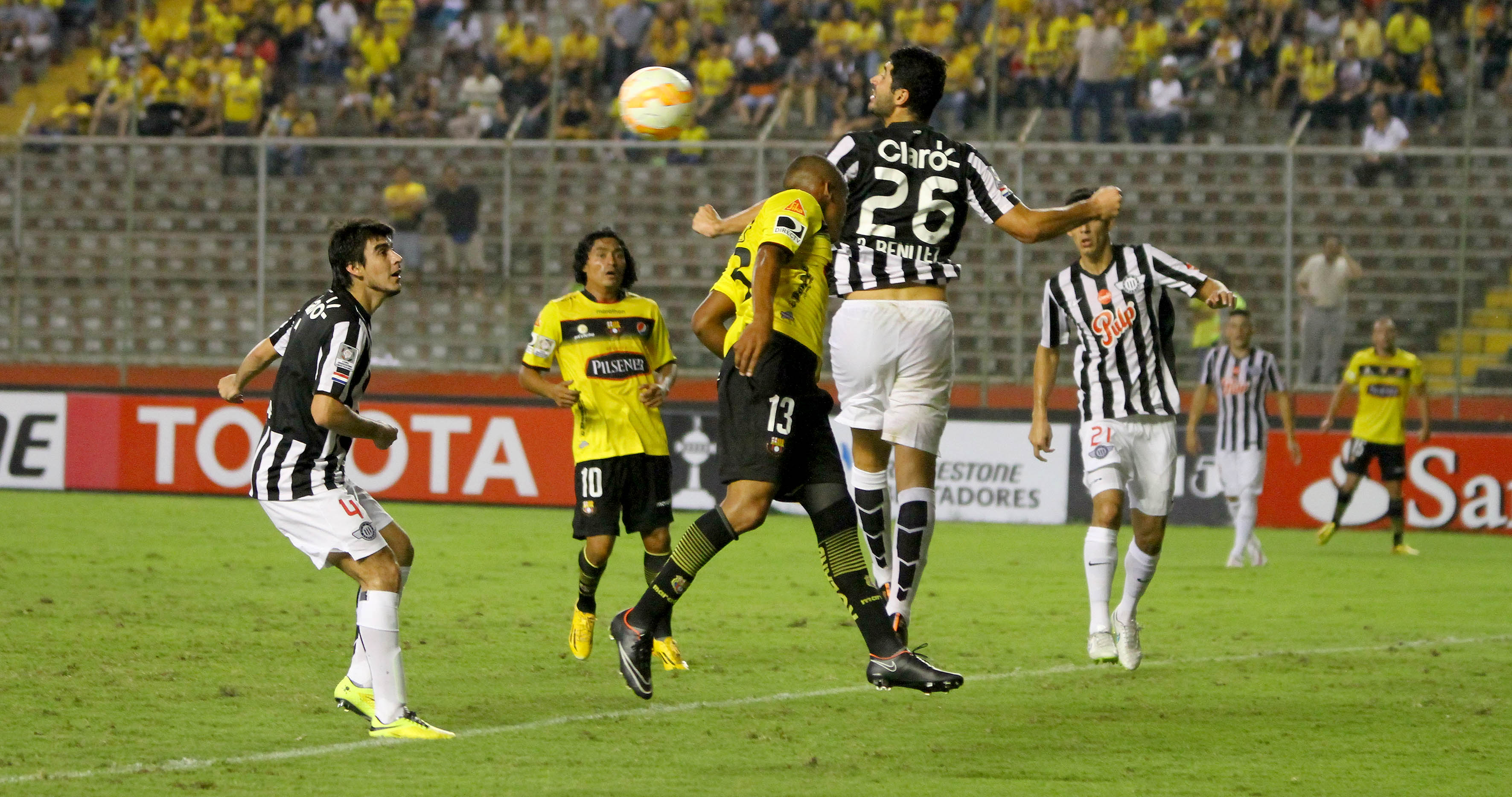 Guayaquil, Martes 3 de marzo del 2015 (ANDES).-Barcelona enfrenta a Libertad de Paraguay en su primer partido por Copa Libertadores Foto:César Muñoz/ANDES